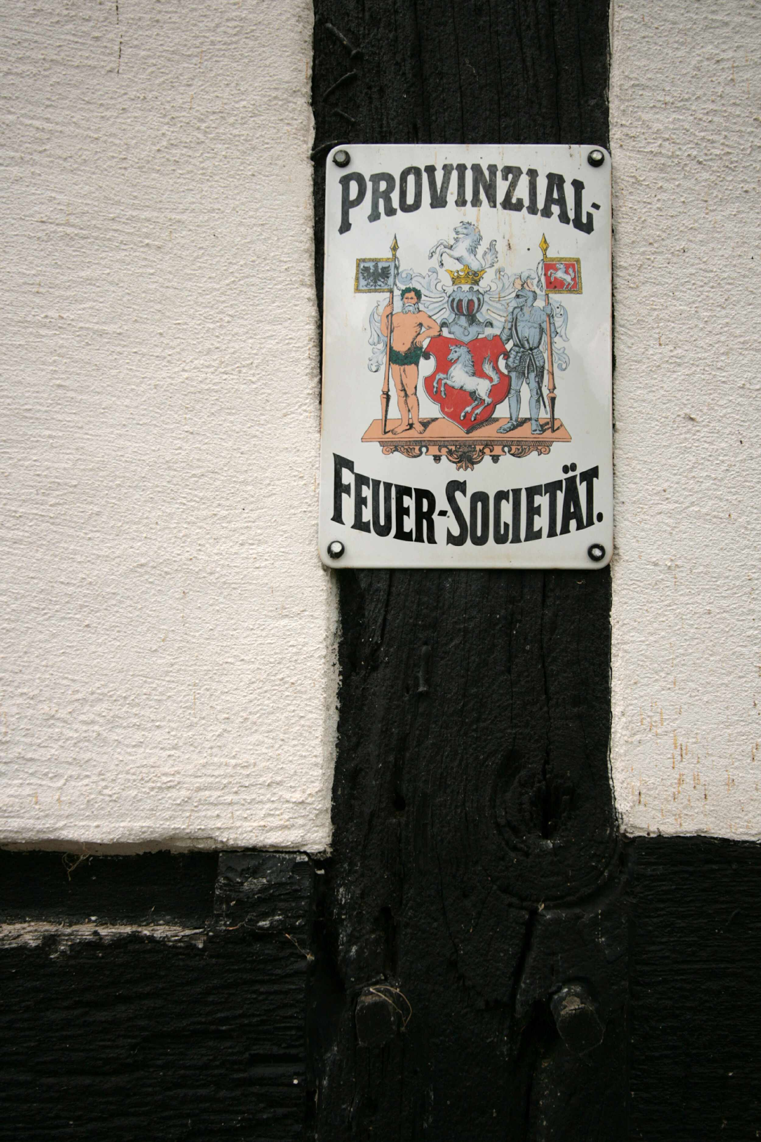 Heimatmuseum Gevelinghausen, Schild der Provinzial Feuerversicherung